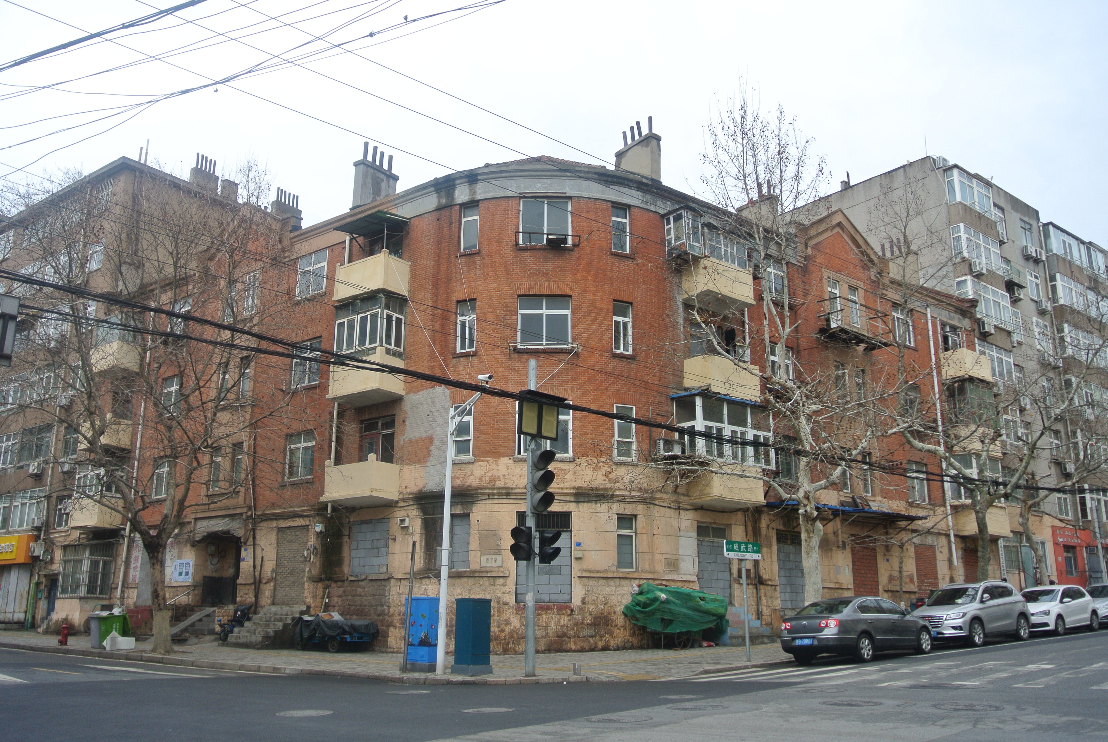 青岛原台西区委办公楼